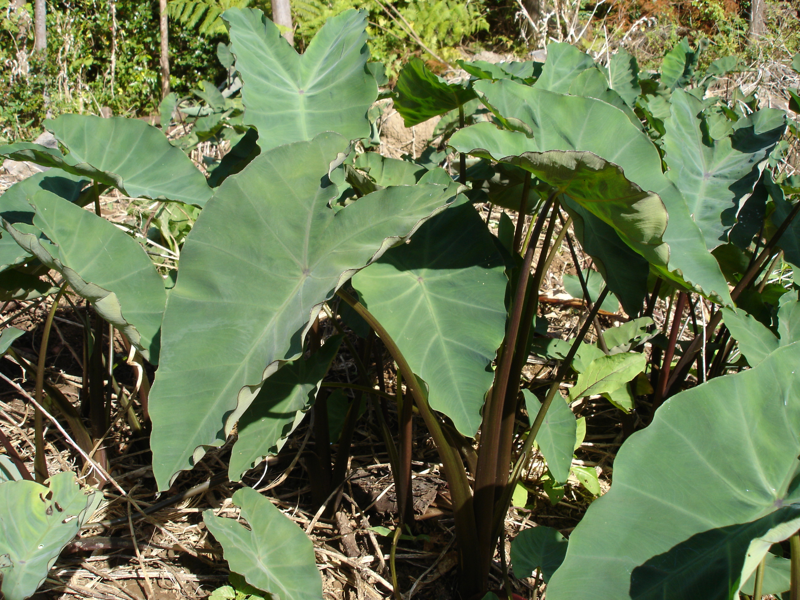 Description: Songe, Colocasia esculenta, novembre 2004, La Réunion Source: Bouba